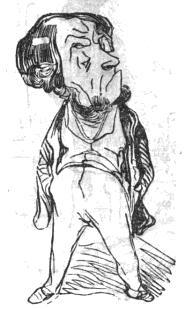 "Place ! Place au grand Gautier, colosse de trois pieds, breveté ministre des finances !"